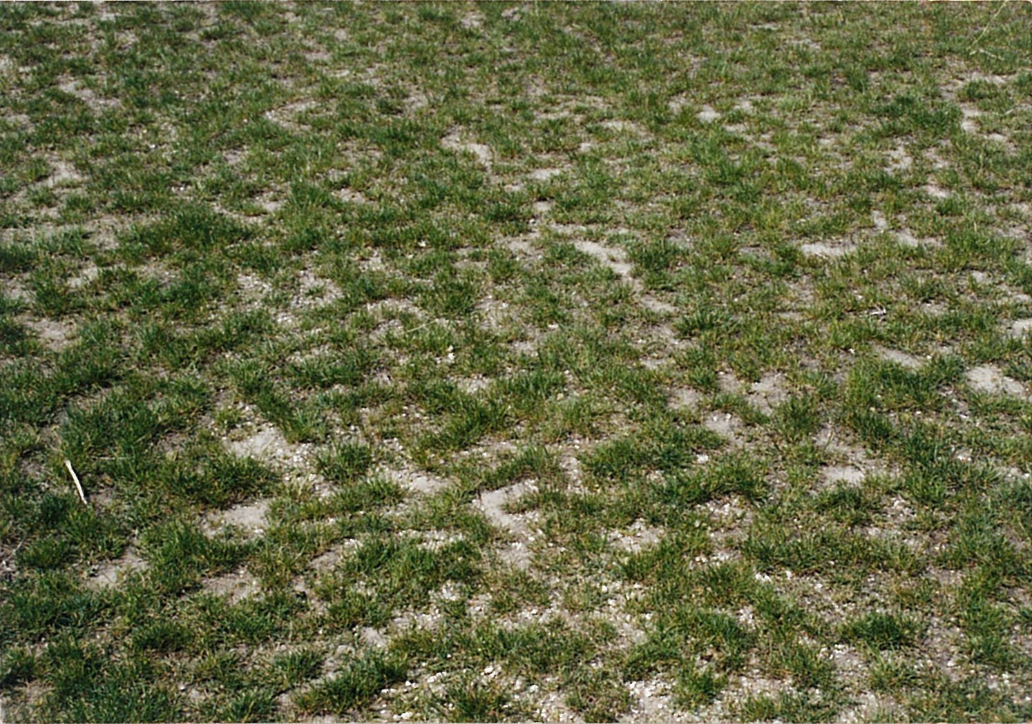 Vegetation auf einem Solonetz Ort: Podersdorf, Österreich Kamera: NIKON F4, Optik: AF-NIKKOR 50mm f/1:1.4